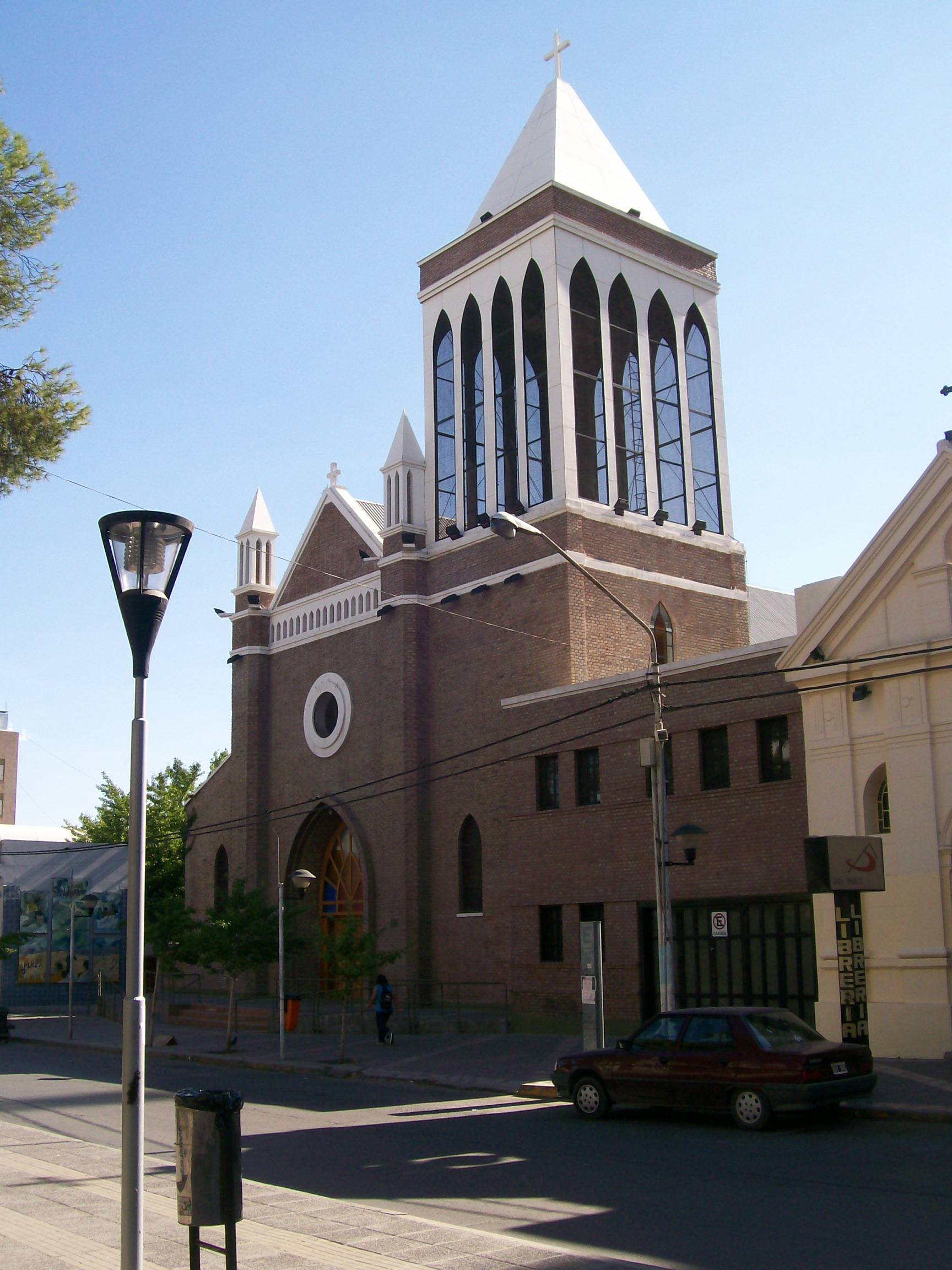 Iglesia Catedral de Neuquen